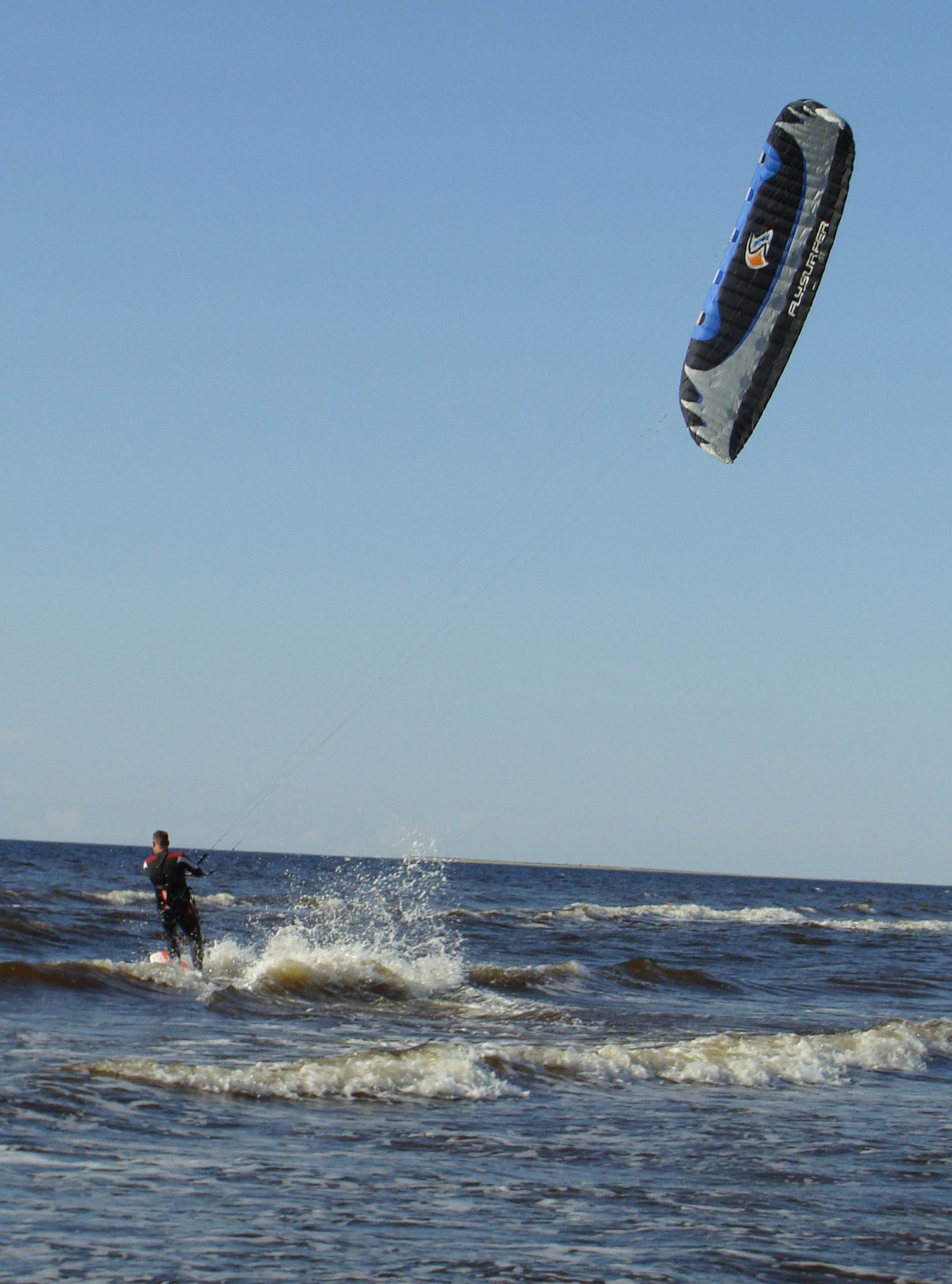 Кайтинг — водный вид спорта, основой которого является движение по поверхности воды под действием силы тяги, развиваемой удерживаемым и управляемым спортсменом воздушным змеем (кайтом).